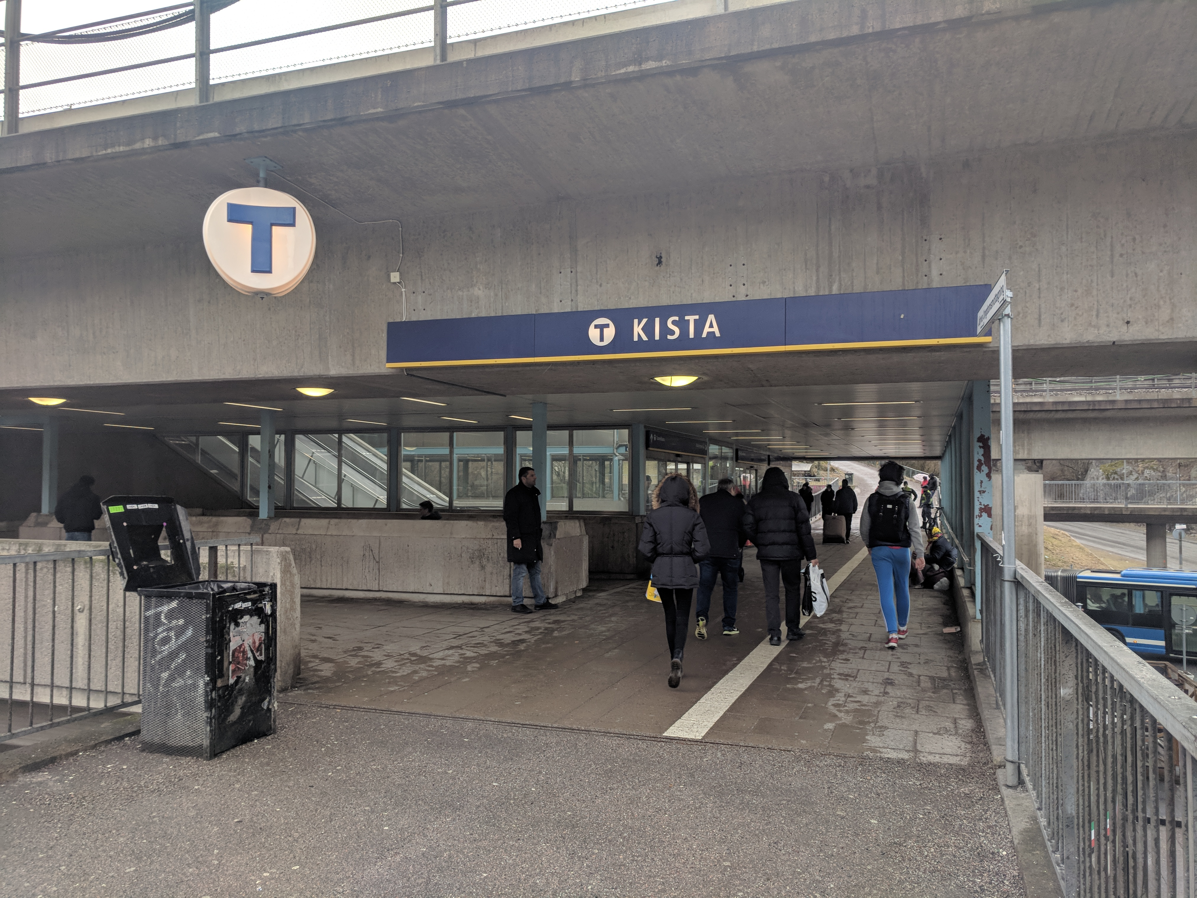 Kista metro